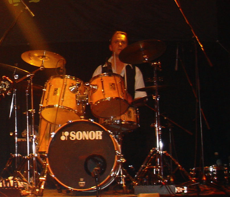 Stefan Dohanetz beim Pankow Konzert 2011 im alten Schlachthof in Dresden